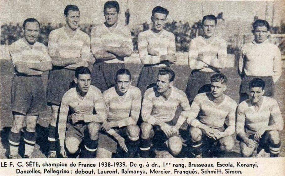 Le FC Sète champion de France 1939 de football.